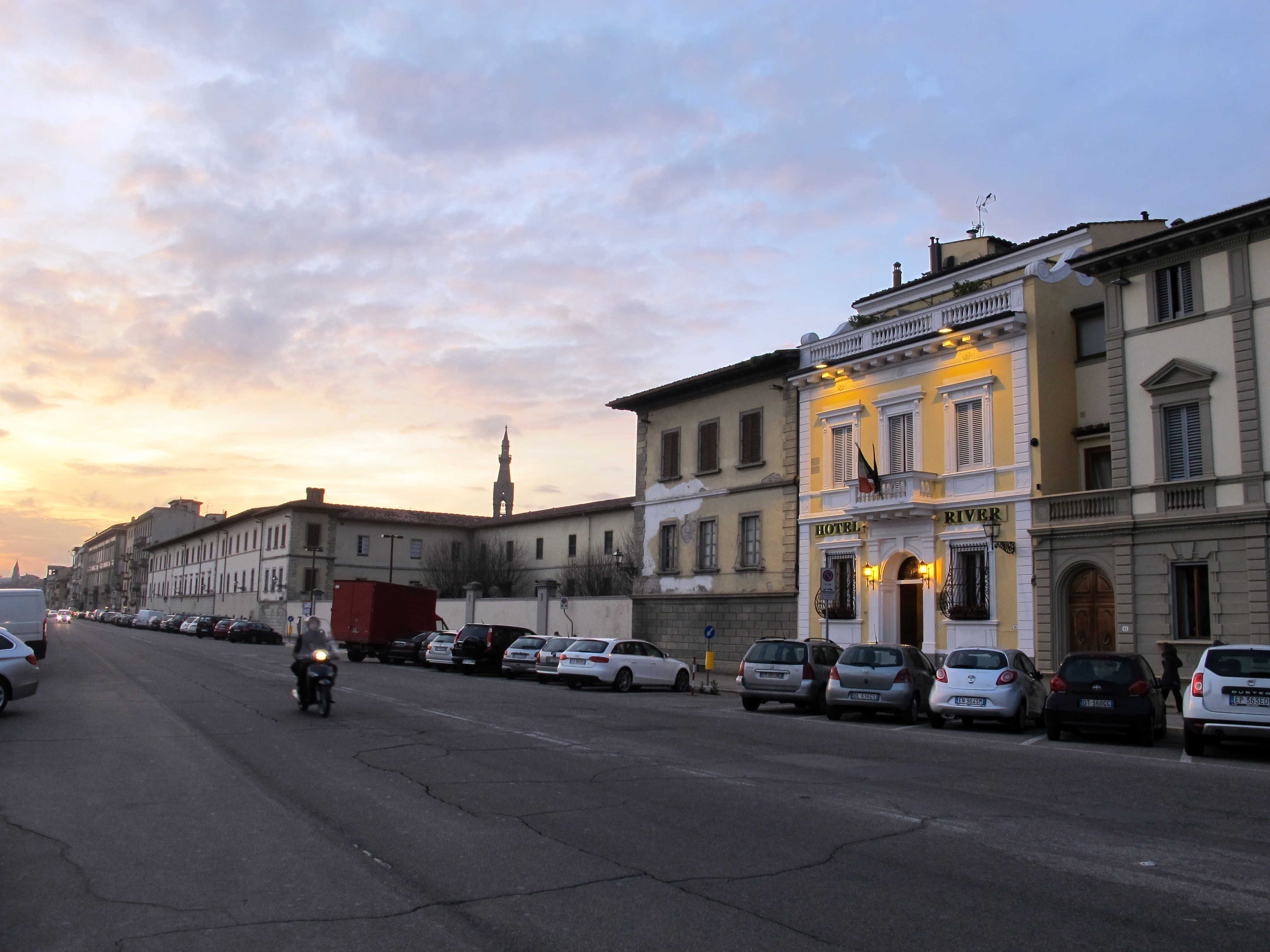 Lungarno della Zecca Vecchia, veduta